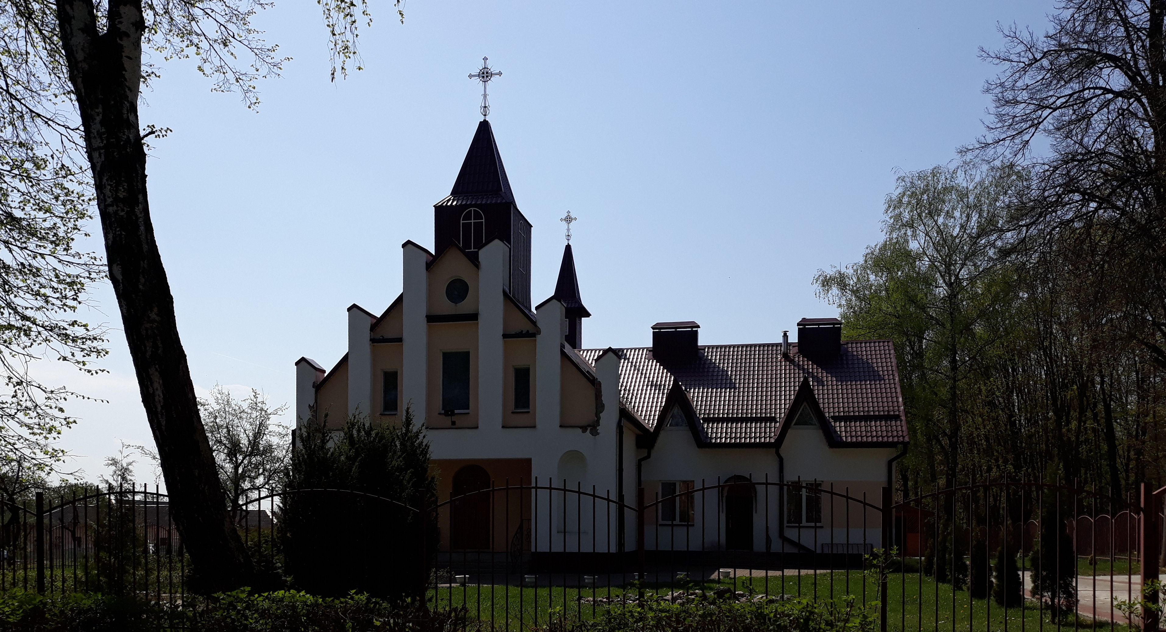 каталіцкі касцёл Божага Цела